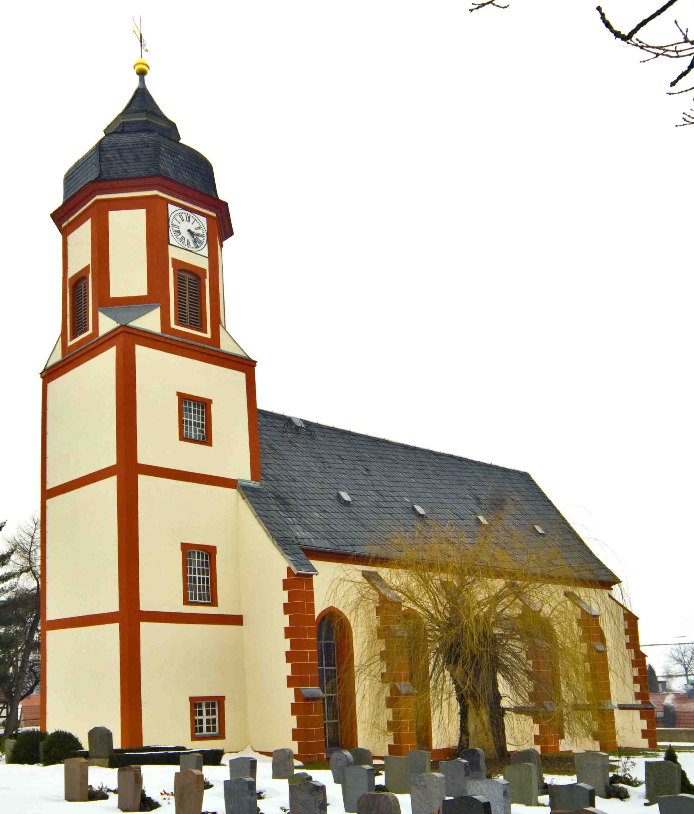 Kirche in Schrebitz Blick in Südrichtung am 23.1.2010